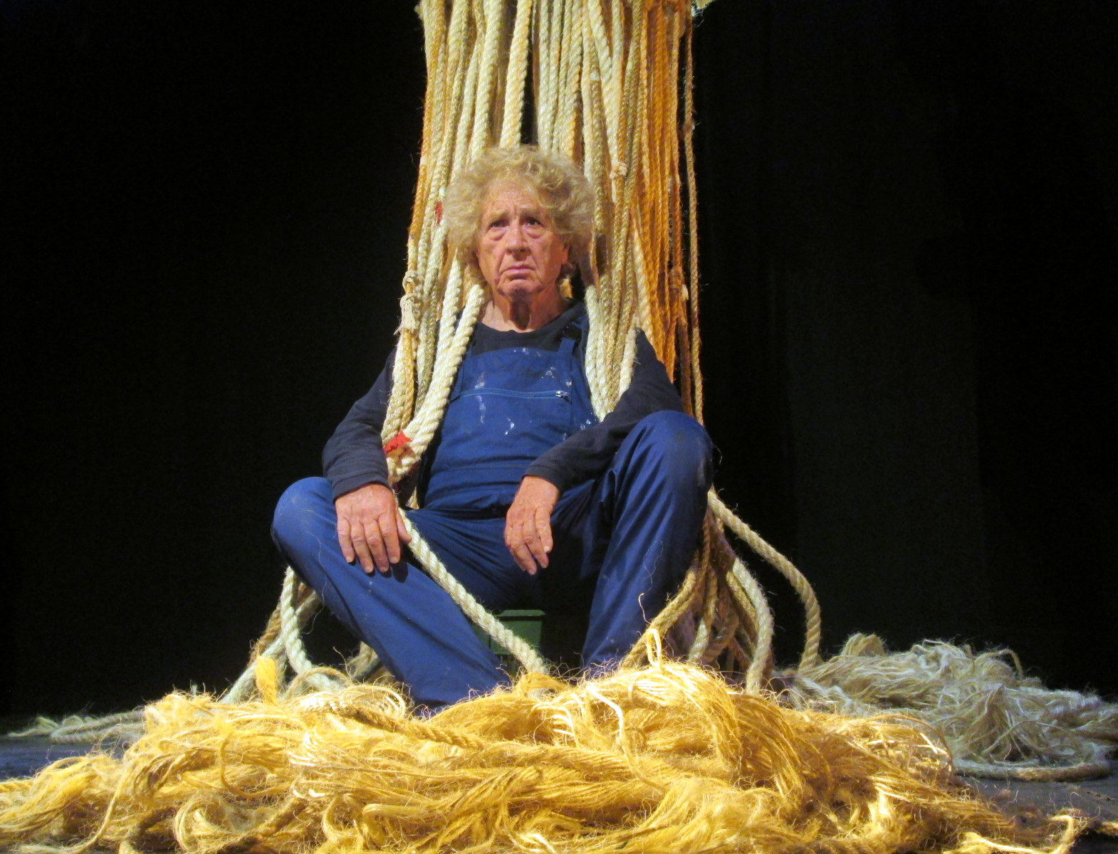 יאיר רובין - מתוך ההצגה תולעים